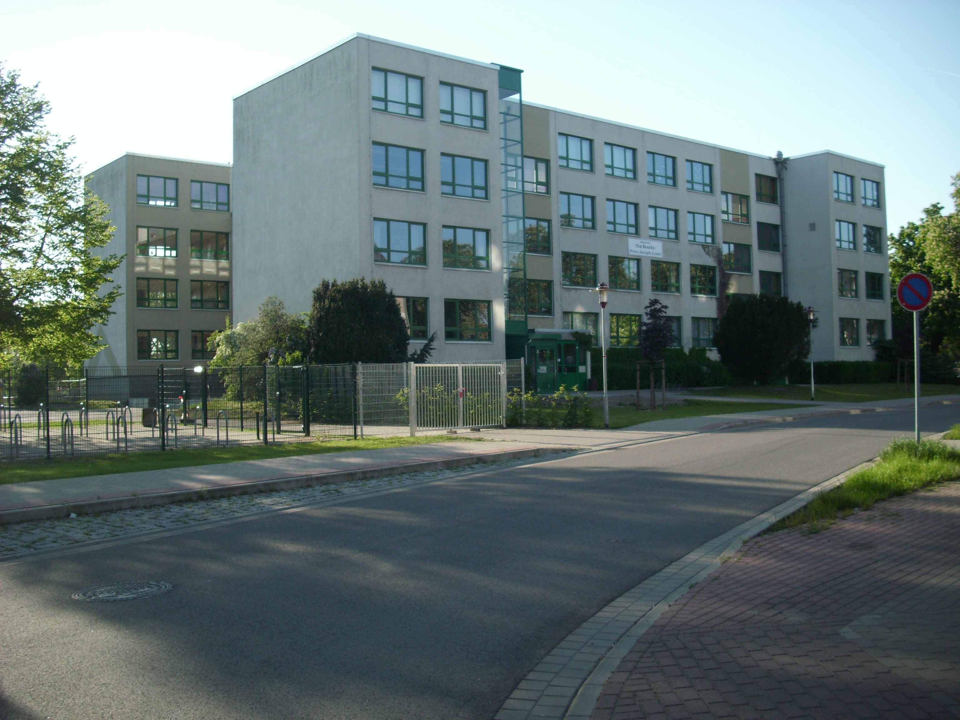 Regionale Schule Peter Joseph Lenné, Ludwigslust, Mecklenburg-Vorpommern